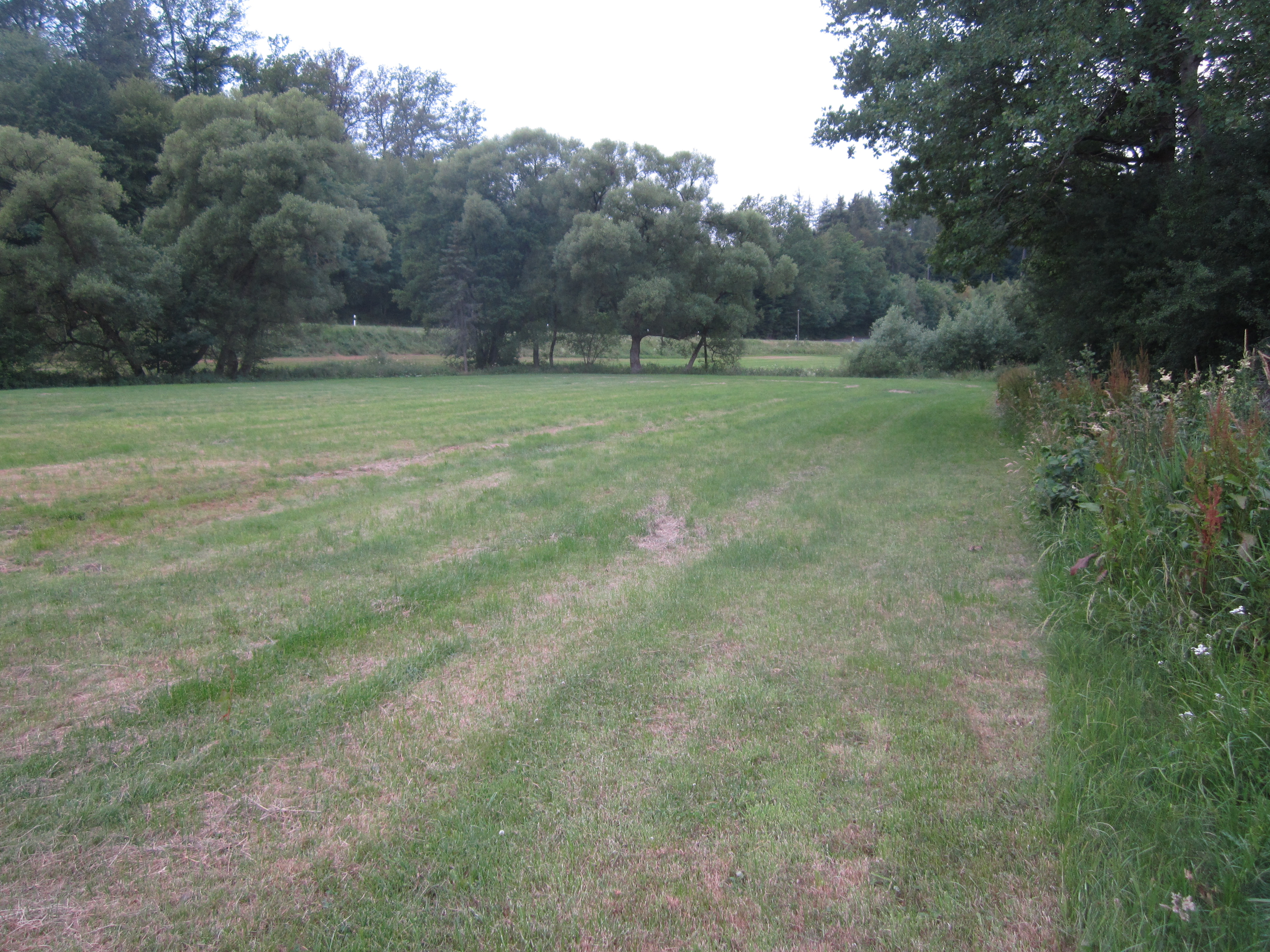 Landschaftsschutzgebiet Talraum der Settmecke und der Bermecke, hier nördlicher Bereich. Links Landstraße und rechts Radweg.